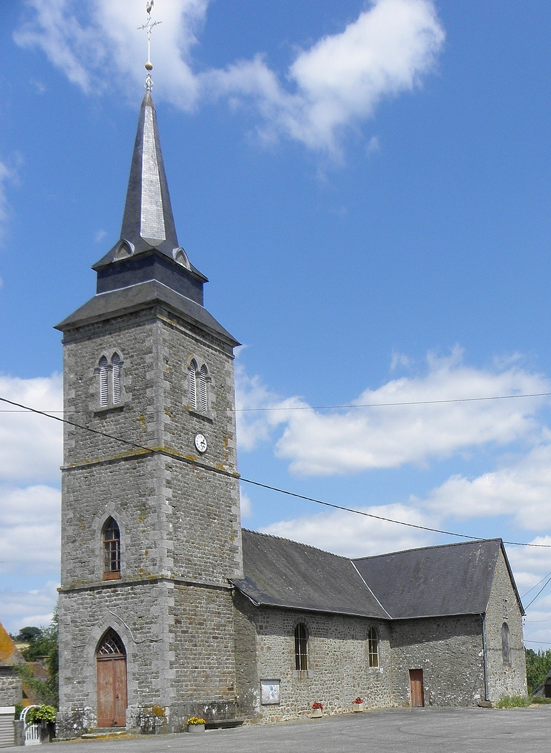 Le Housseau-Brétignolles (53). Église Notre-Dame-de-l'Assomption de Brétignolles-le-Moulin.